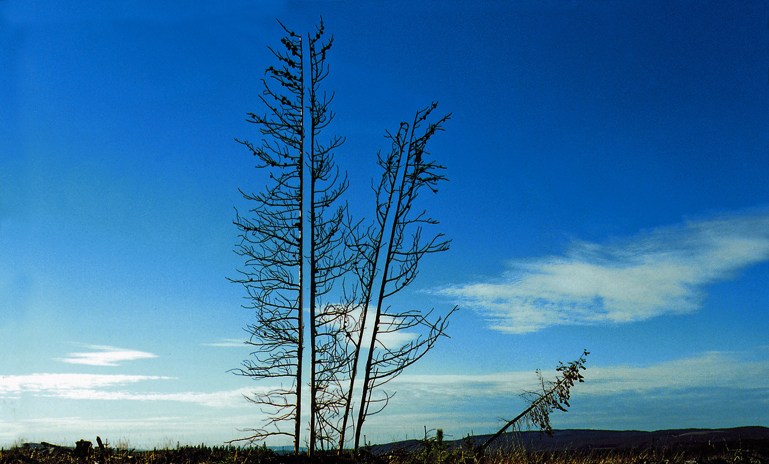 Dürre Bergpinien mit der Kettensäge zweigeteilt. Ort: Okanagan Mountains, British Columbia, Kanada